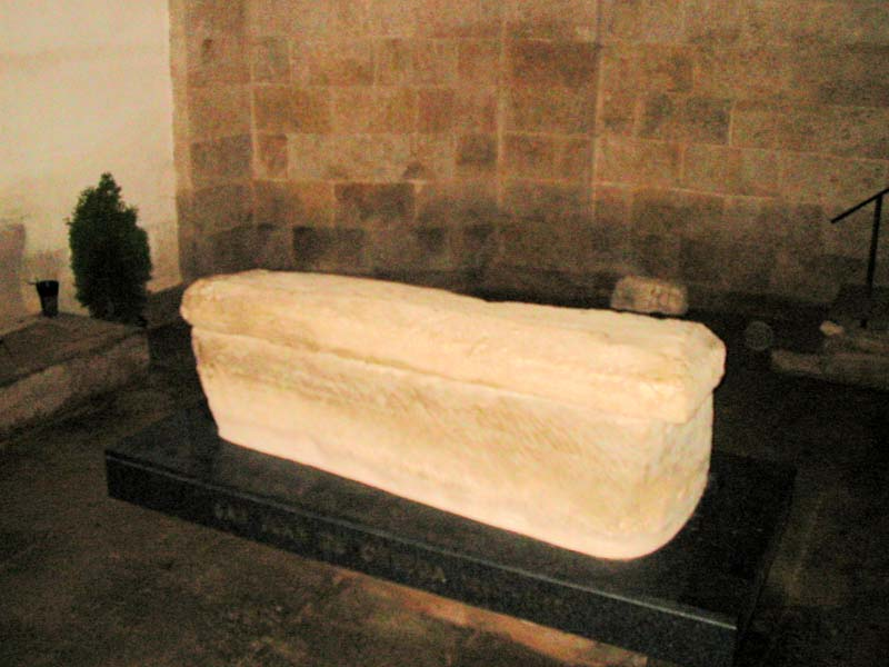 Primer sepulcro de San Juan de Ortega, del s. XII (Monasterio de S. Juan de Ortega)